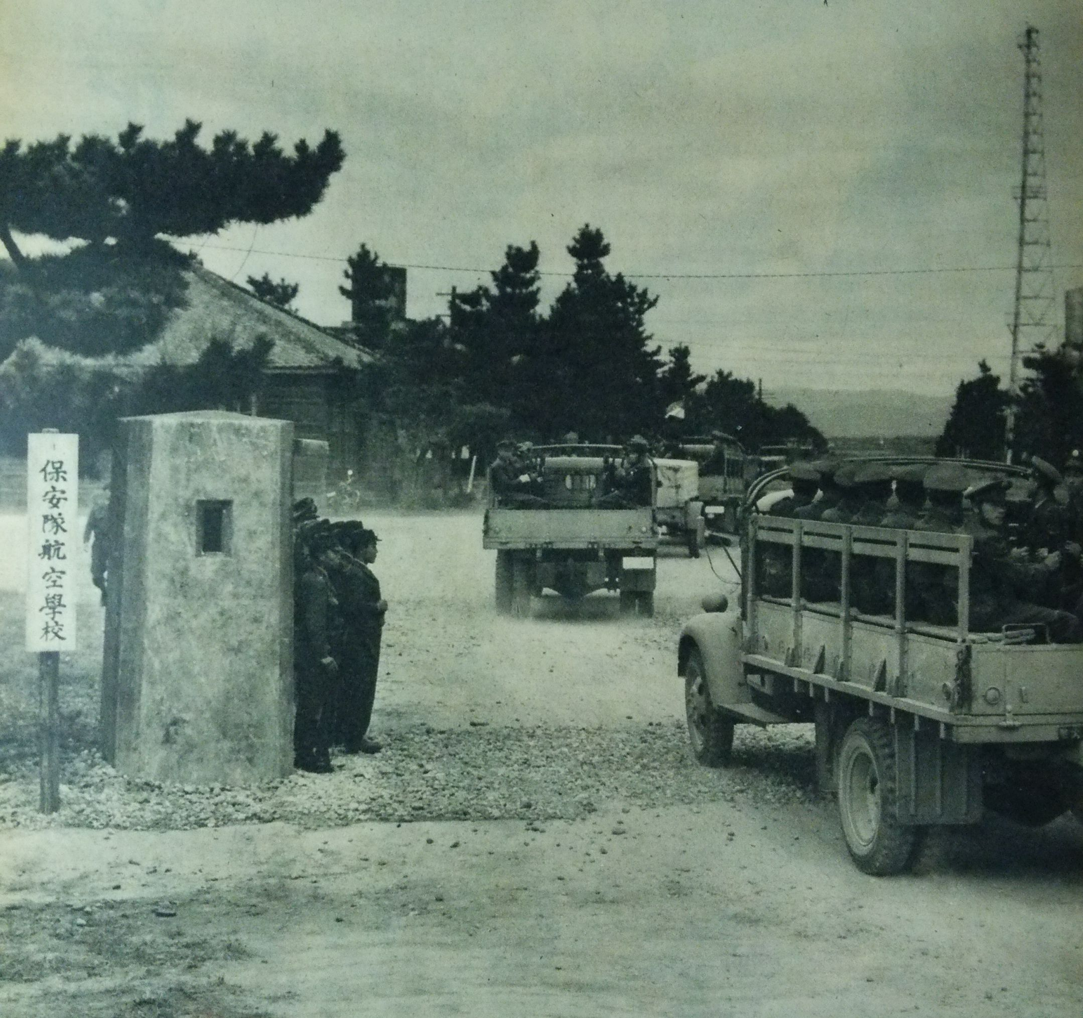 設立当初の保安隊航空学校（現在の航空自衛隊浜松基地に在した）